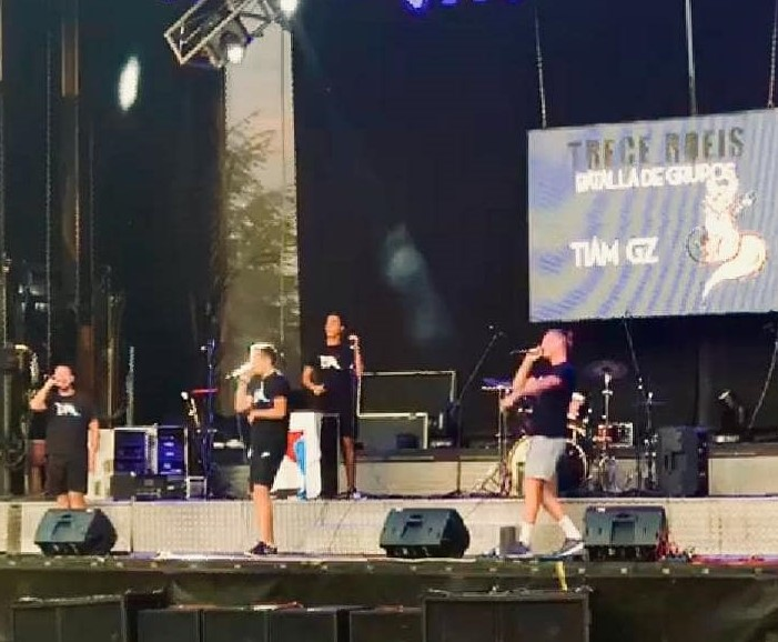 TIAM Gz na batalla de grupos do Trece Roeis en Ferreira de Pantón